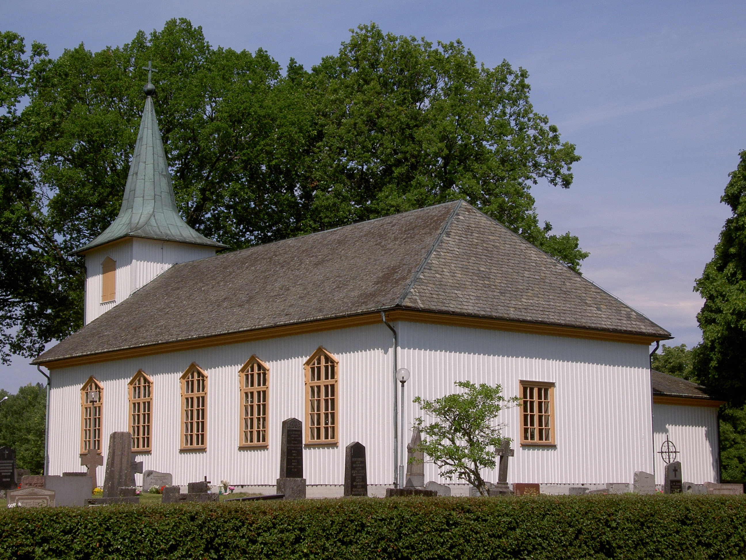 Tisselskogs kyrka